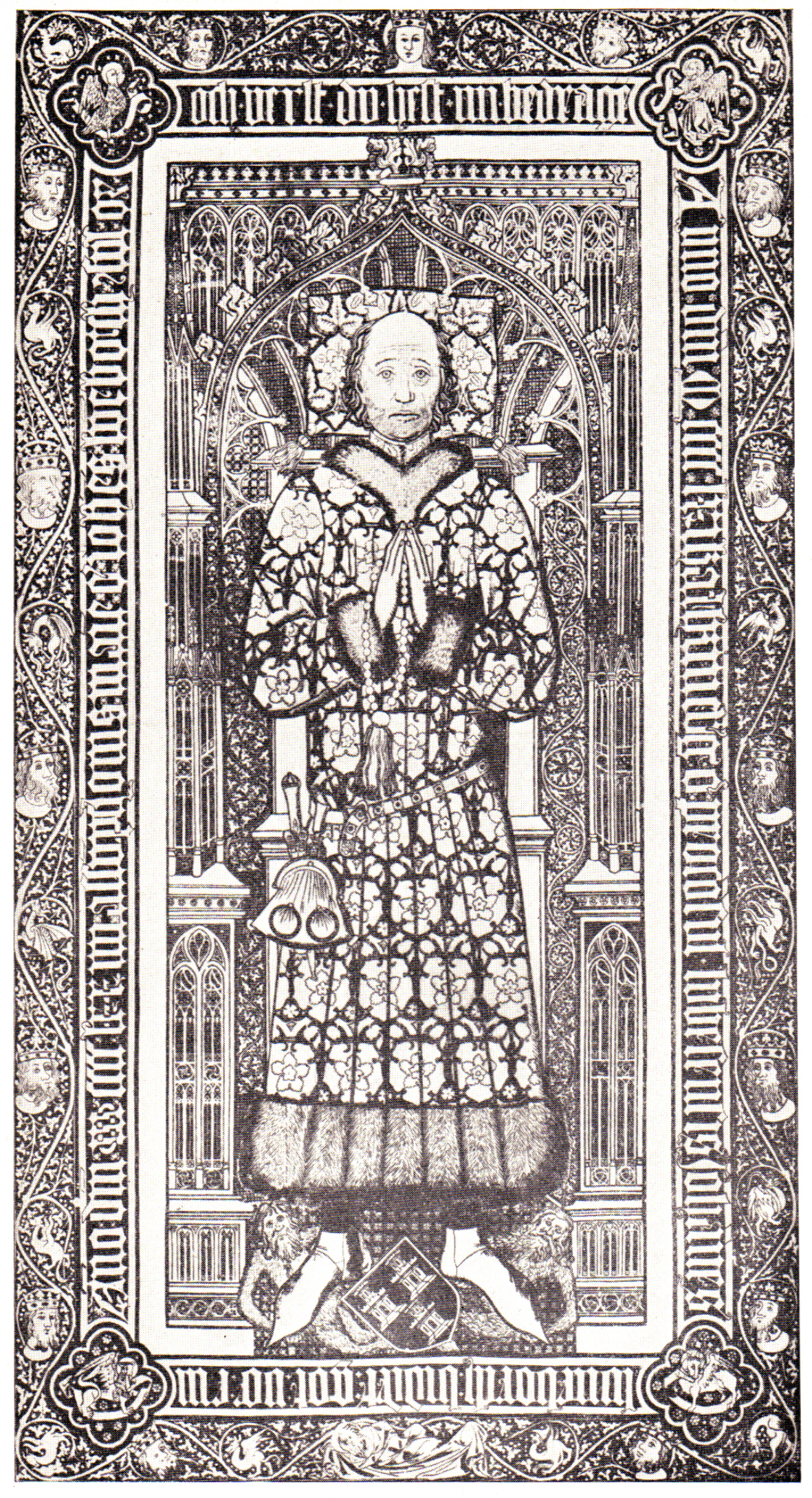 Johann Lüneburg (* vor/um 1400; † 1461), Bürgermeister der Hansestadt Lübeck. Porträt auf seiner Grabplatte, 15. Jahrhundert